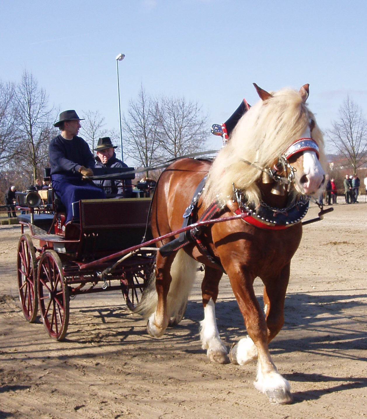 Schwarzwälder